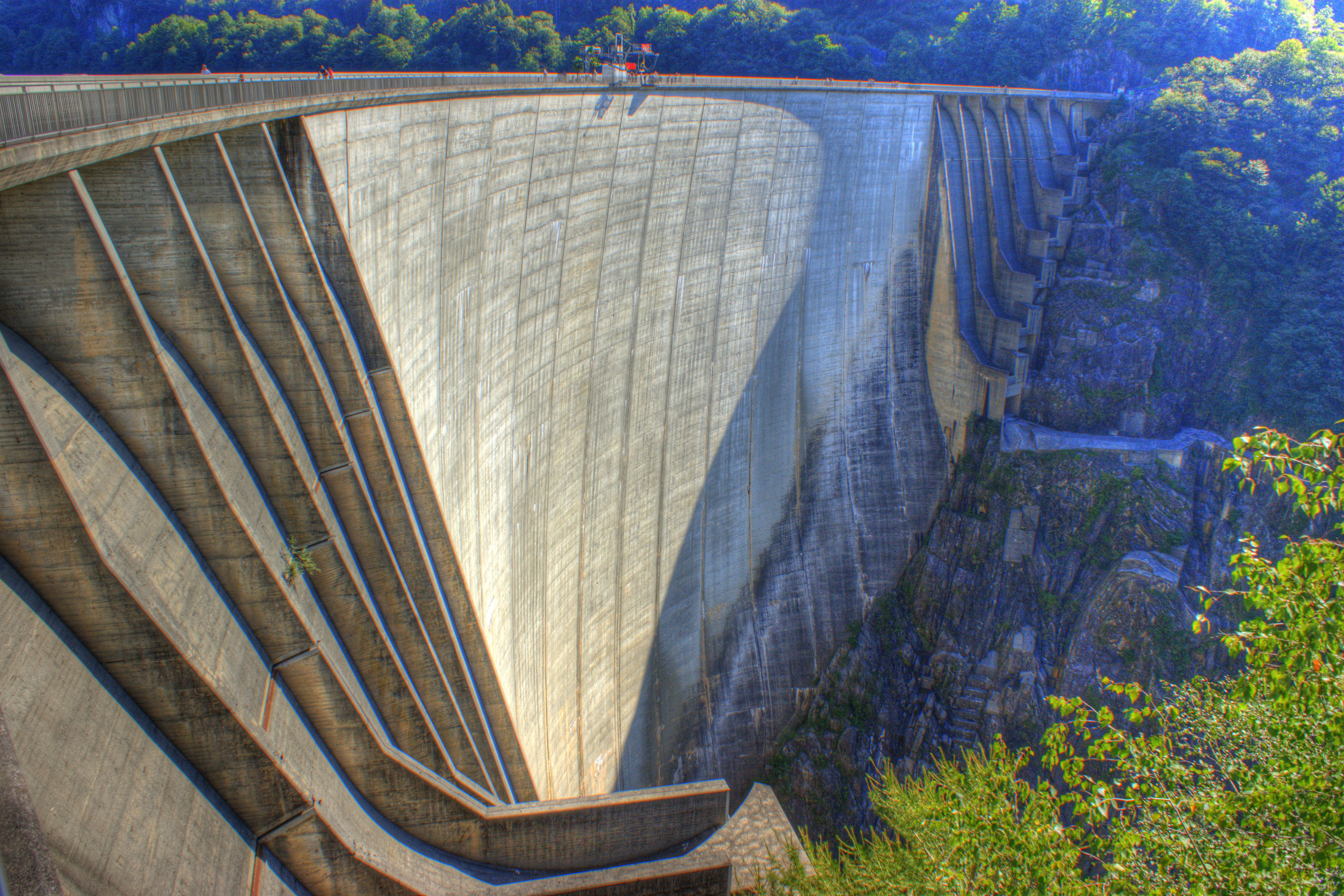 verzasca embankment dam